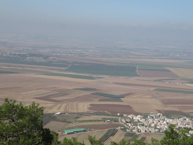 גבעת המורה